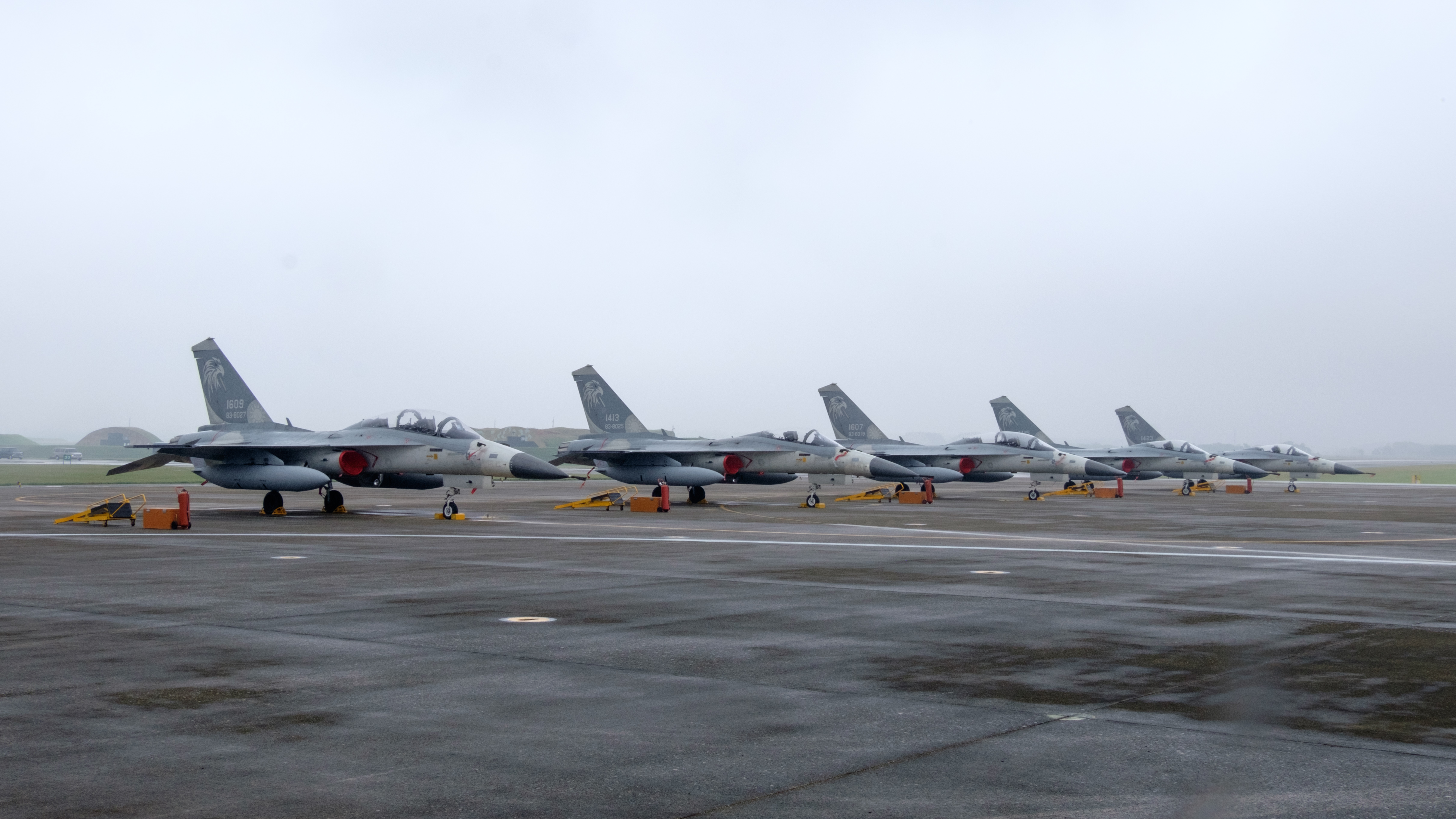 2016年空軍清泉崗基地營區開放活動下午，衝場飛行結束降落後，列隊停放會場西南的五架427聯隊經國號戰鬥機，前起：F-CK-1B 1609、F-CK-1A 1413、F-CK-1B 1607、F-CK-1A 1415、F-CK-1A 1423。